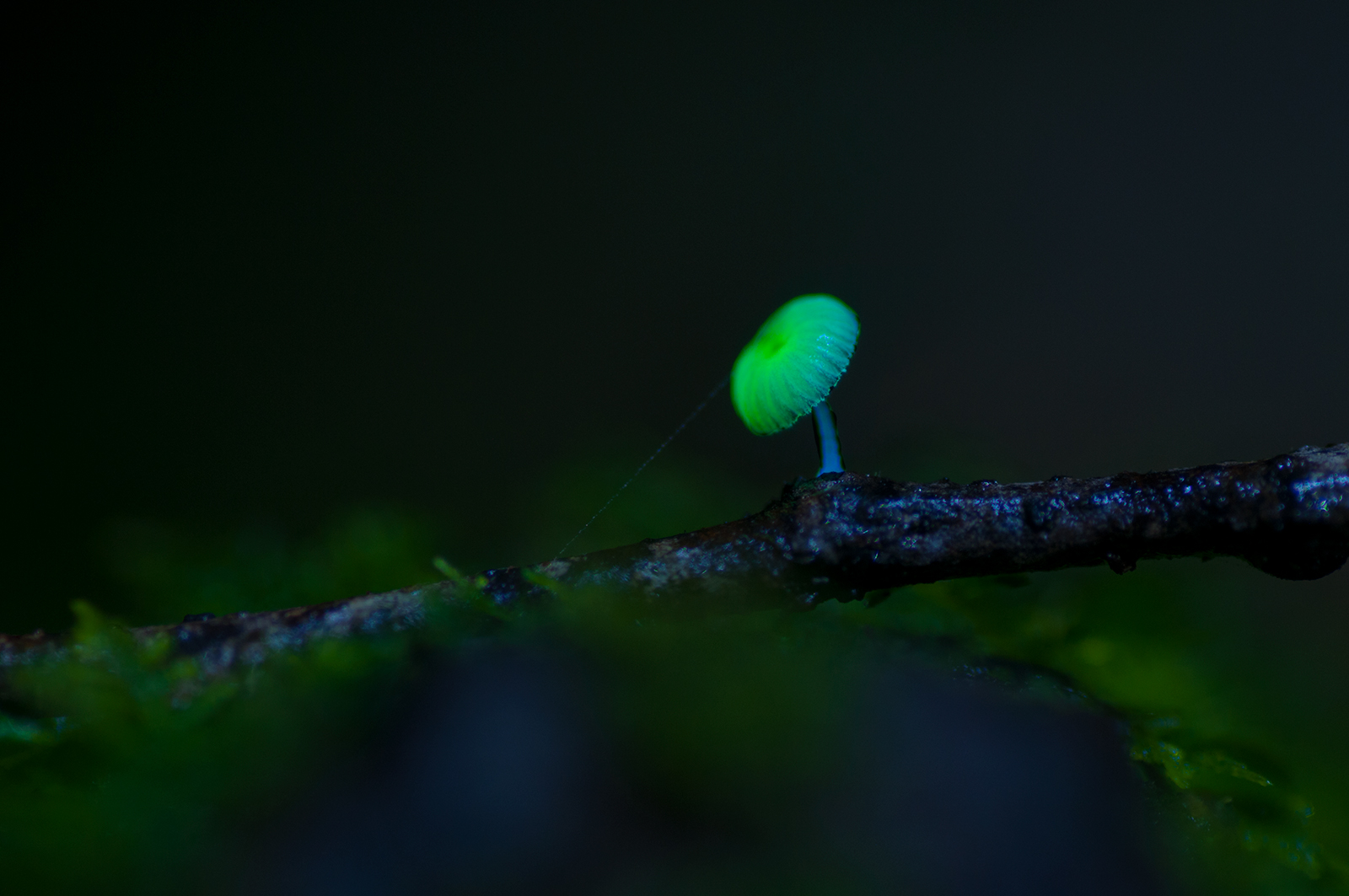 Glowing Mushroom atau jamur menyala memiliki kemampuan bioluminescent yang dapat mengeluarkan cahaya hijau di malam hari untuk menarik serangga dalam membantu menyebarkan spora jamur. Jamur ini merupakan salah satu ikon flora Taman Nasional Gunung Halimun Salak, masyarakat setempat sering menyebutnya dengan sebutan “Supa Lumar”